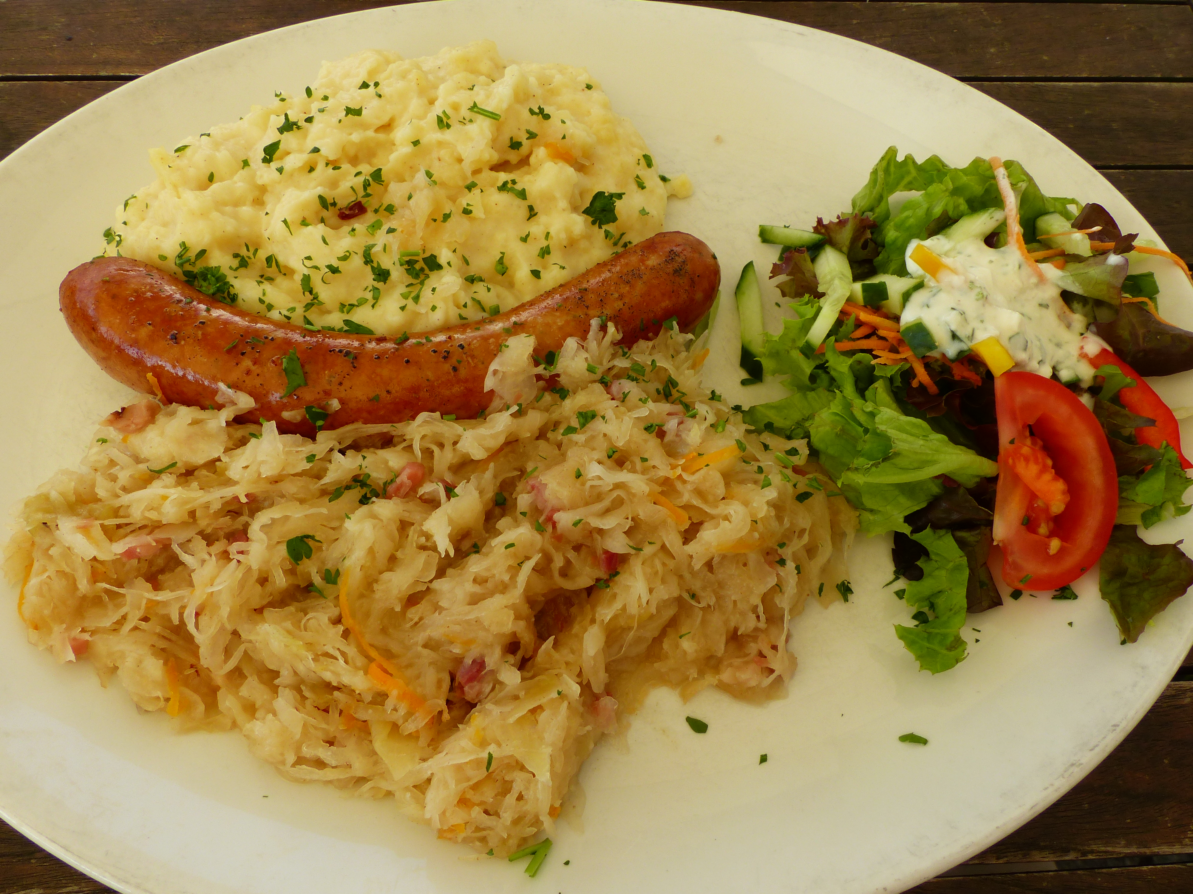 Thüringer Rostbratwurst mit Sauerkraut und Kartoffelpüree im Restaurant Schnitzler am Domplatz in Erfurt